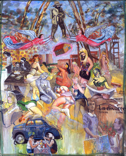 Peinture sur toile de Jean Jacques Surian